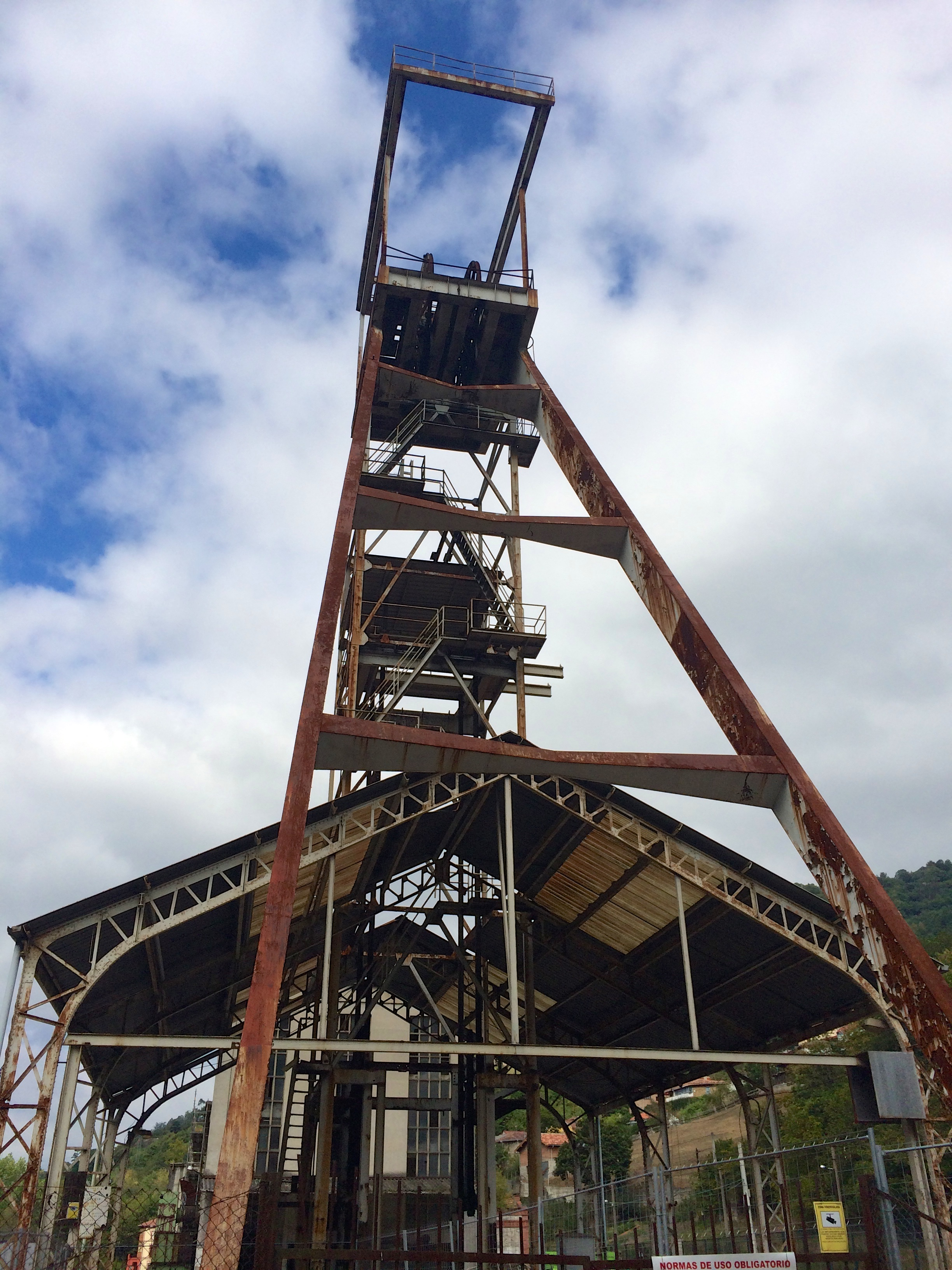 Castillete del pozo principal de Santa Bárbara (Turón), en Asturias (España).